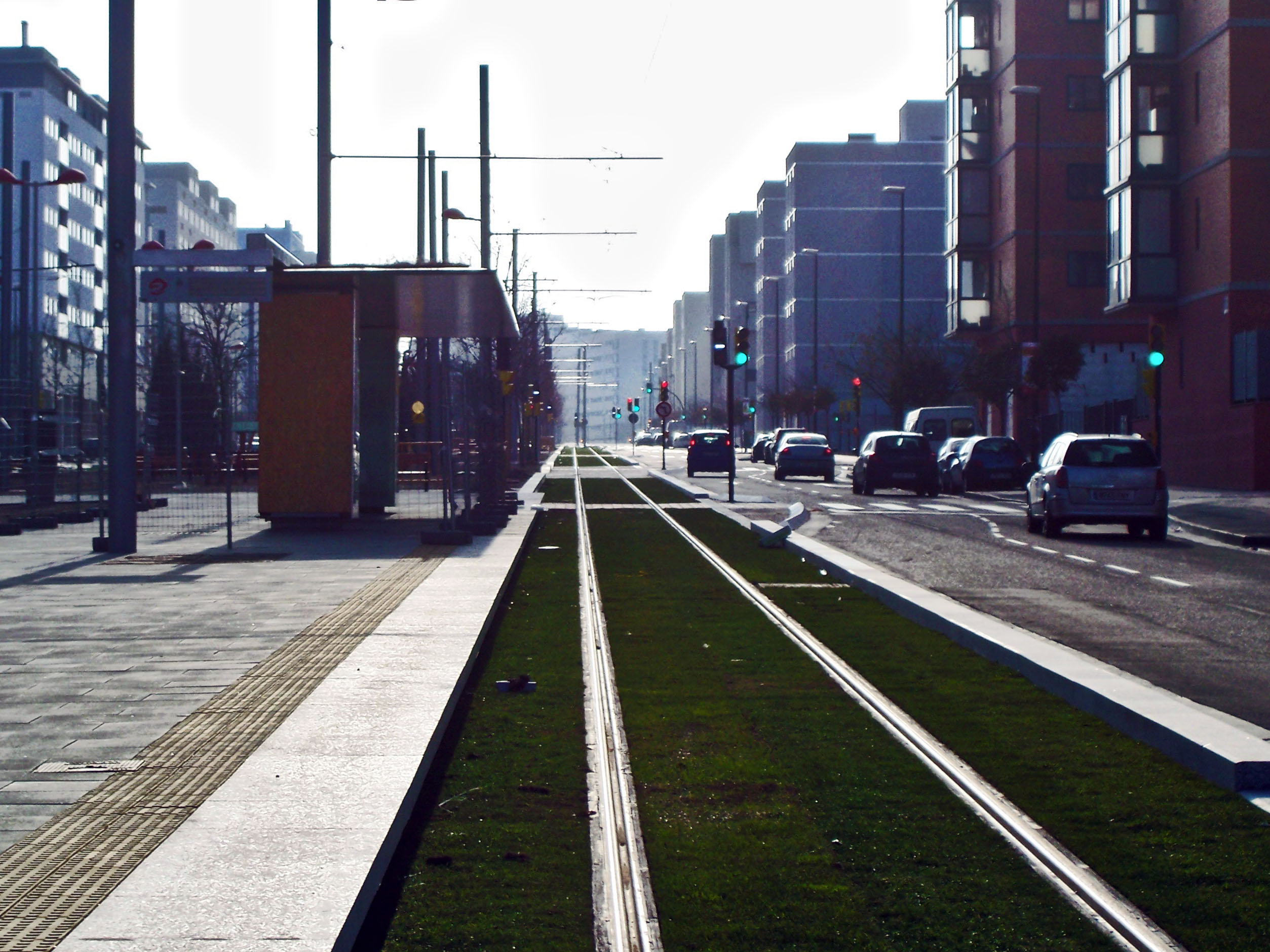 Vías del Tranvía de Zaragoza